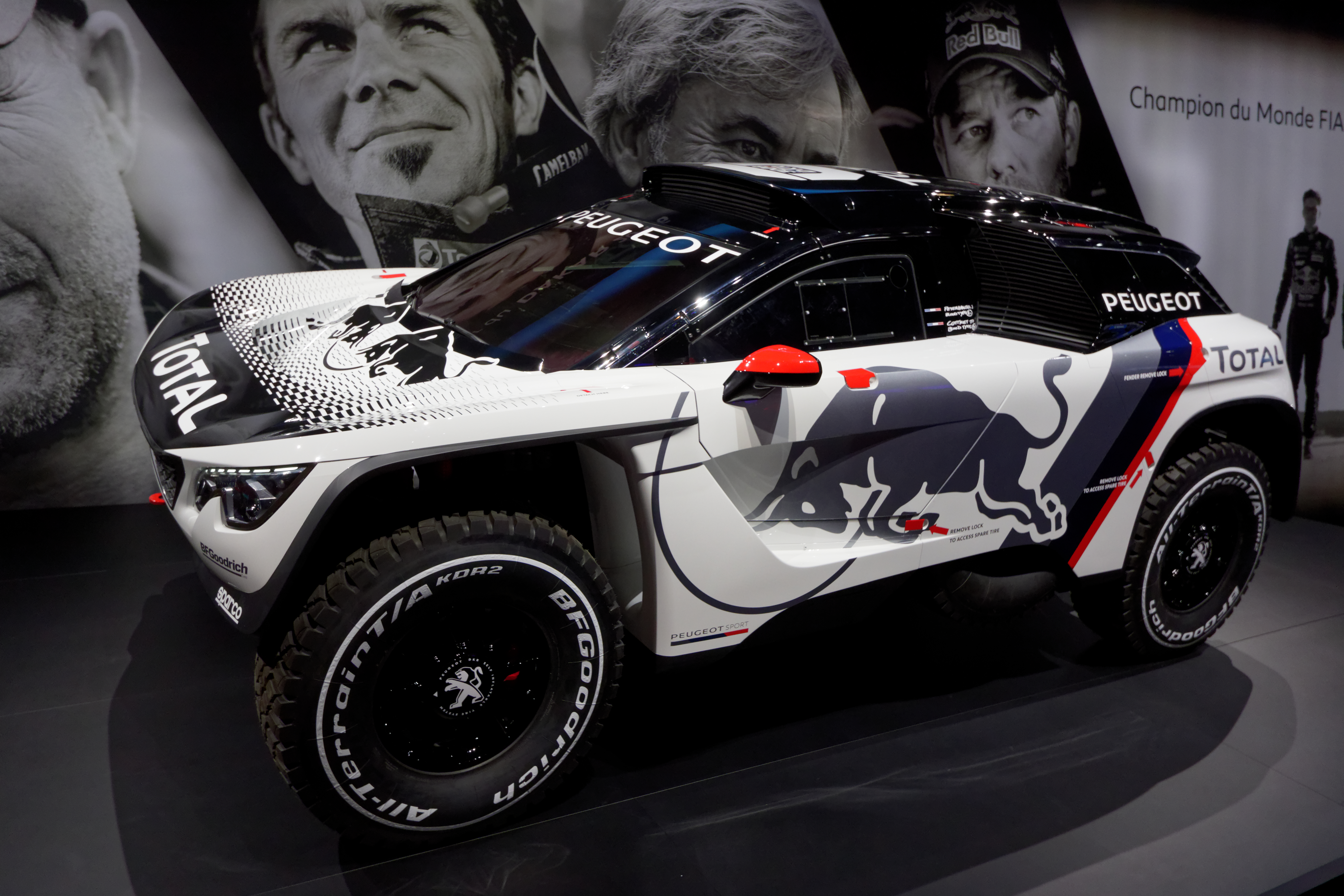 Une Peugeot 3008 DKR présentée lors du mondial de l'automobile de Paris 2016.